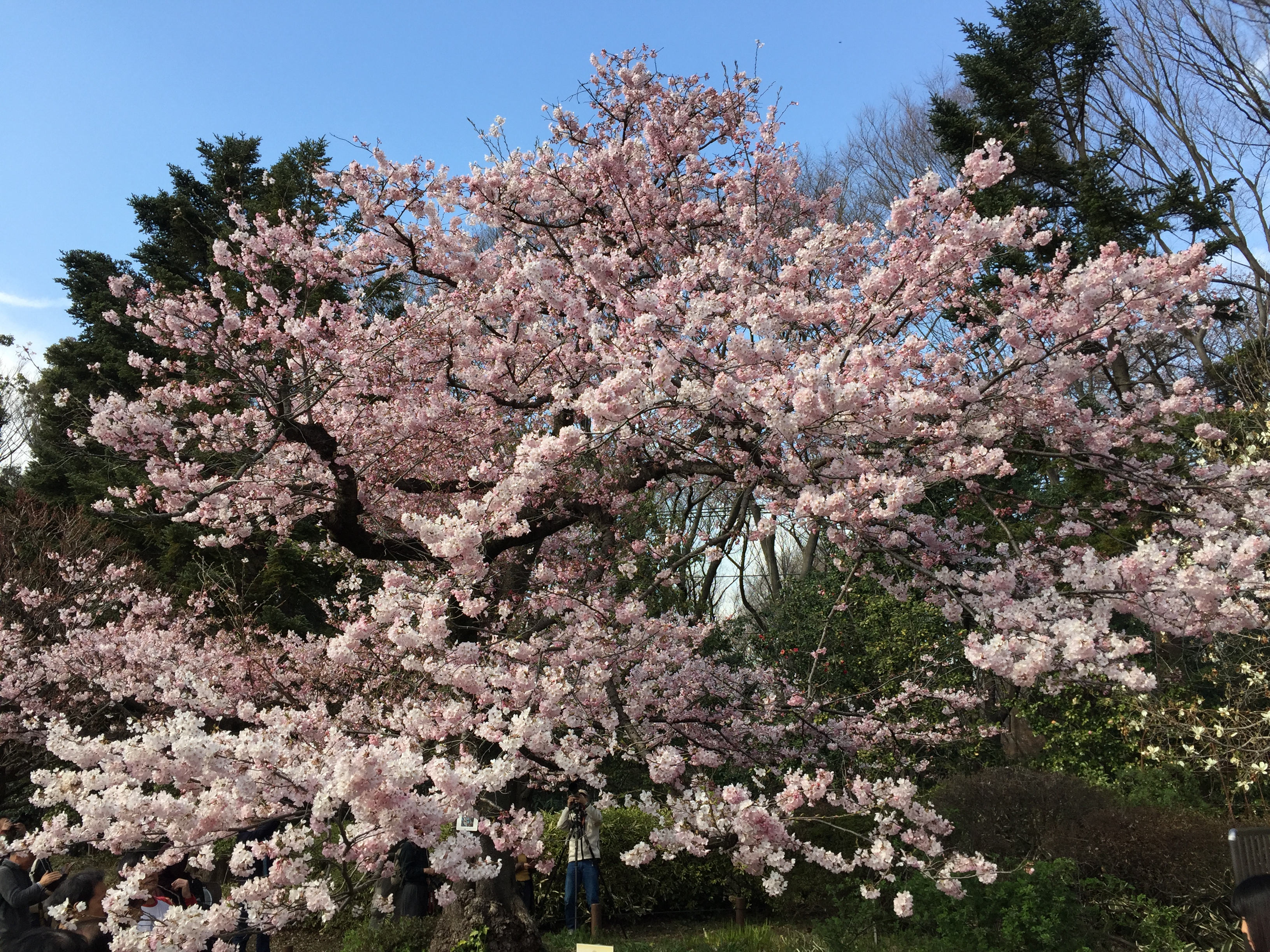 神代植物公園にあるジンダイアケボノの原木